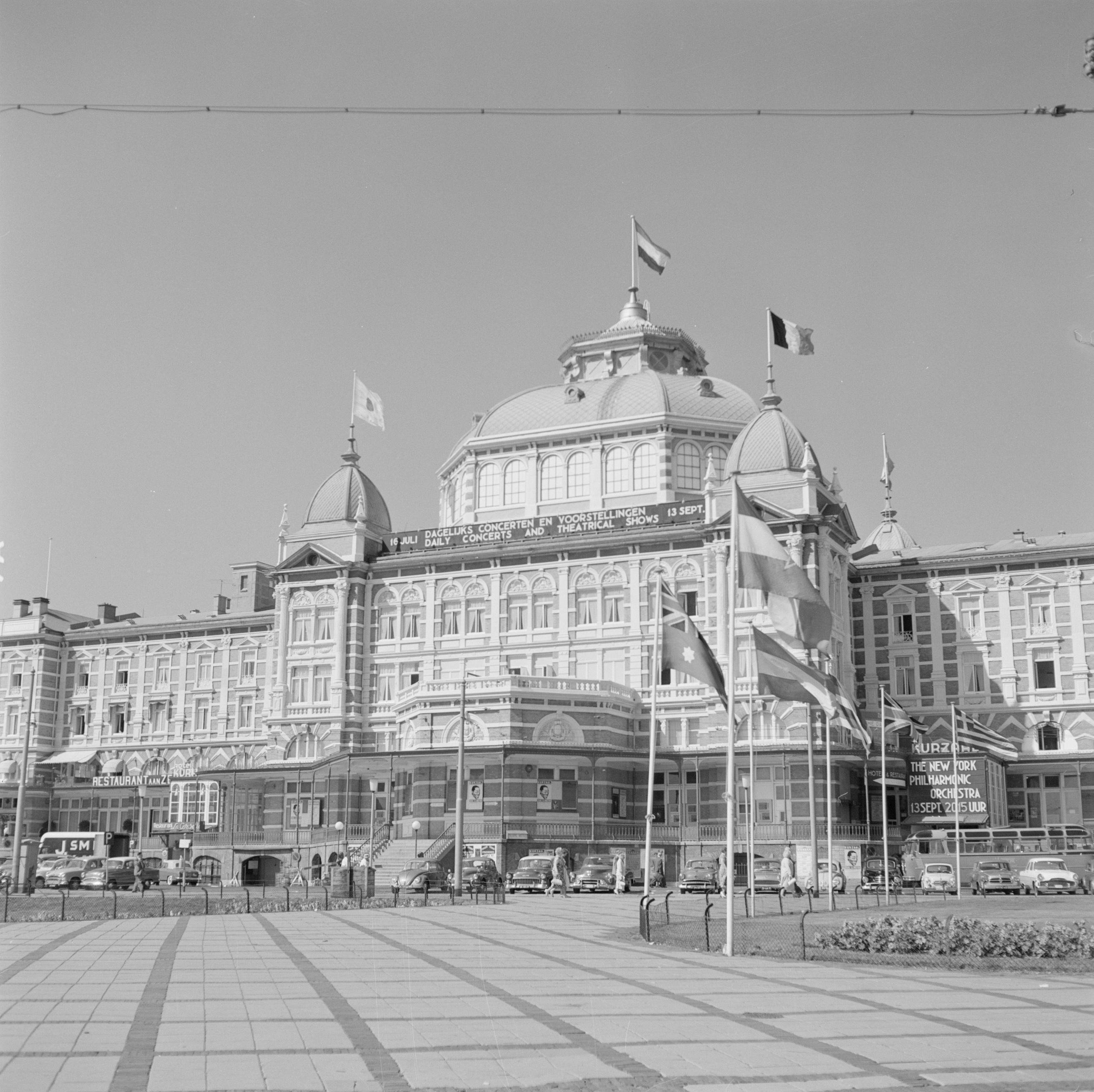 Collectie / Archief : Fotocollectie Van de Poll Reportage / Serie : Scheveningen. Beschrijving : Gezicht op het Kurhaus in Scheveningen vanaf het Gevers Deynootplein Datum : september 1959 Locatie : Scheveningen, Zuid-Holland Trefwoorden : hotels Instellingsnaam : Kurhaus Fotograaf : Poll, Willem van de, [onbekend] Auteursrechthebbende : Nationaal Archief Materiaalsoort : Negatief (6x6) Nummer archiefinventaris : bekijk toegang 2.24.14.02 Bestanddeelnummer : 254-4010